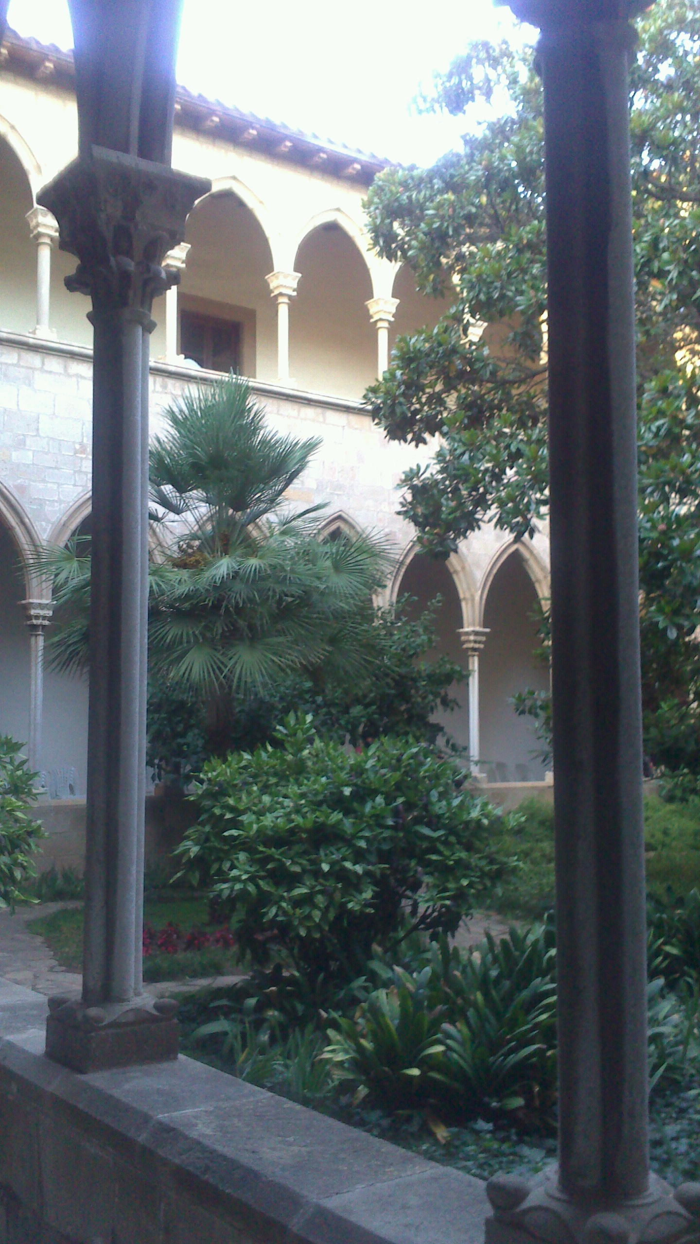 Claustre del Convent de Santa Maria de Montsió (Esplugues de Llobregat)